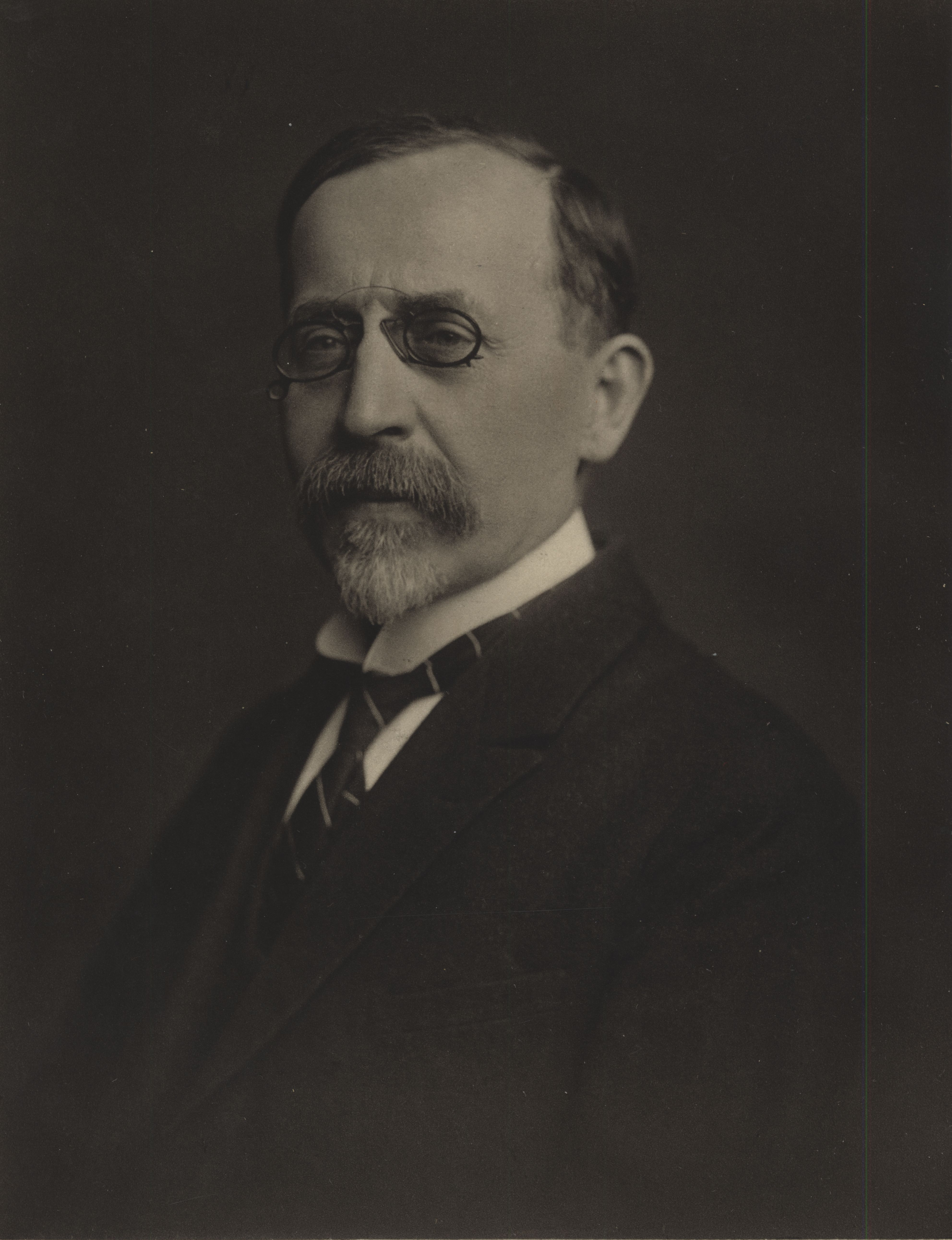 Portrét Gustava Friedricha vytvořený Janem Nepomukem Langhansem